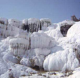 Travertin d'origine volcanique. Pamukkale. Turquie